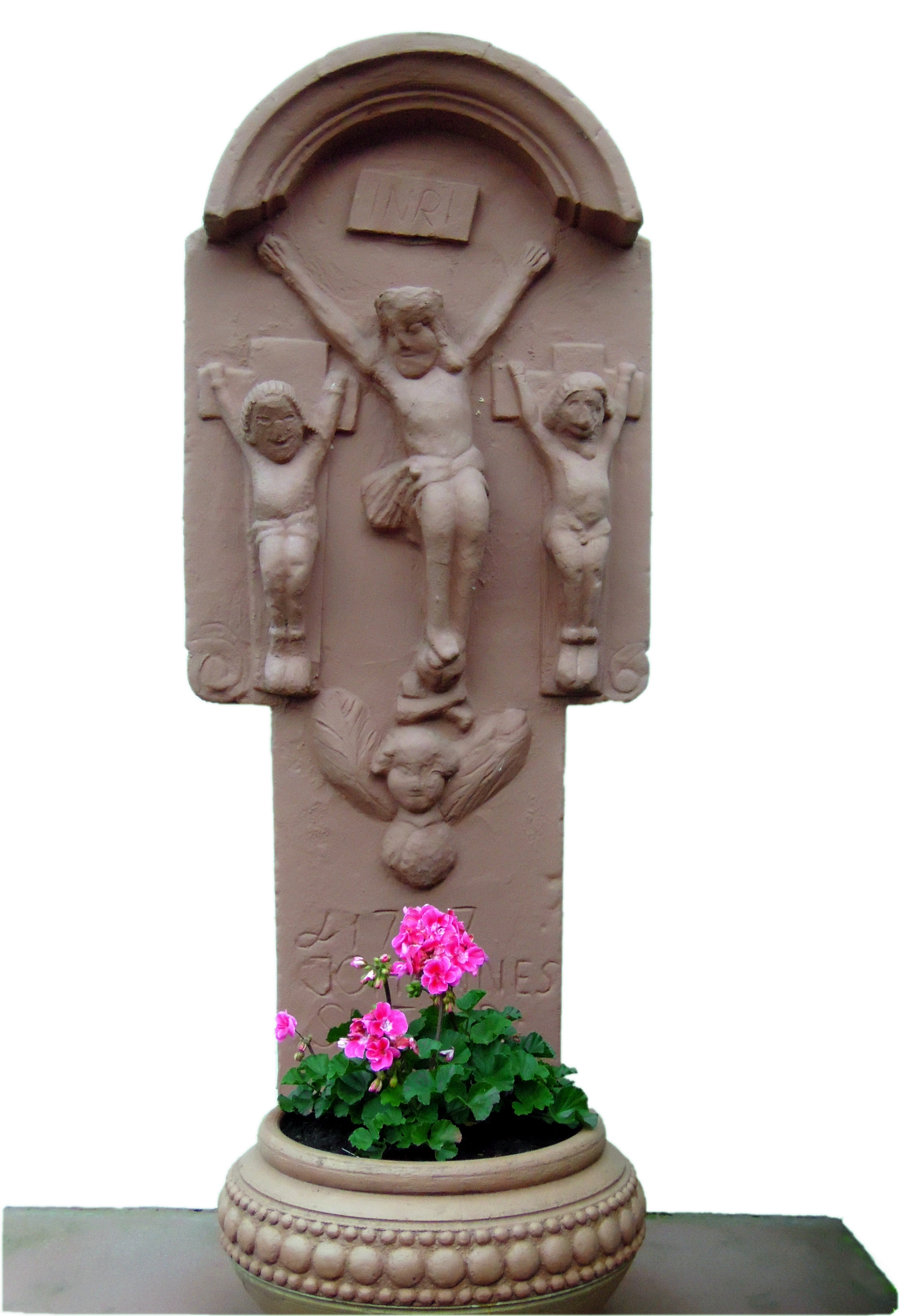 Keltenstraße 56, Kreuzigungsgruppe, 1727 (Einzeldenkmal)